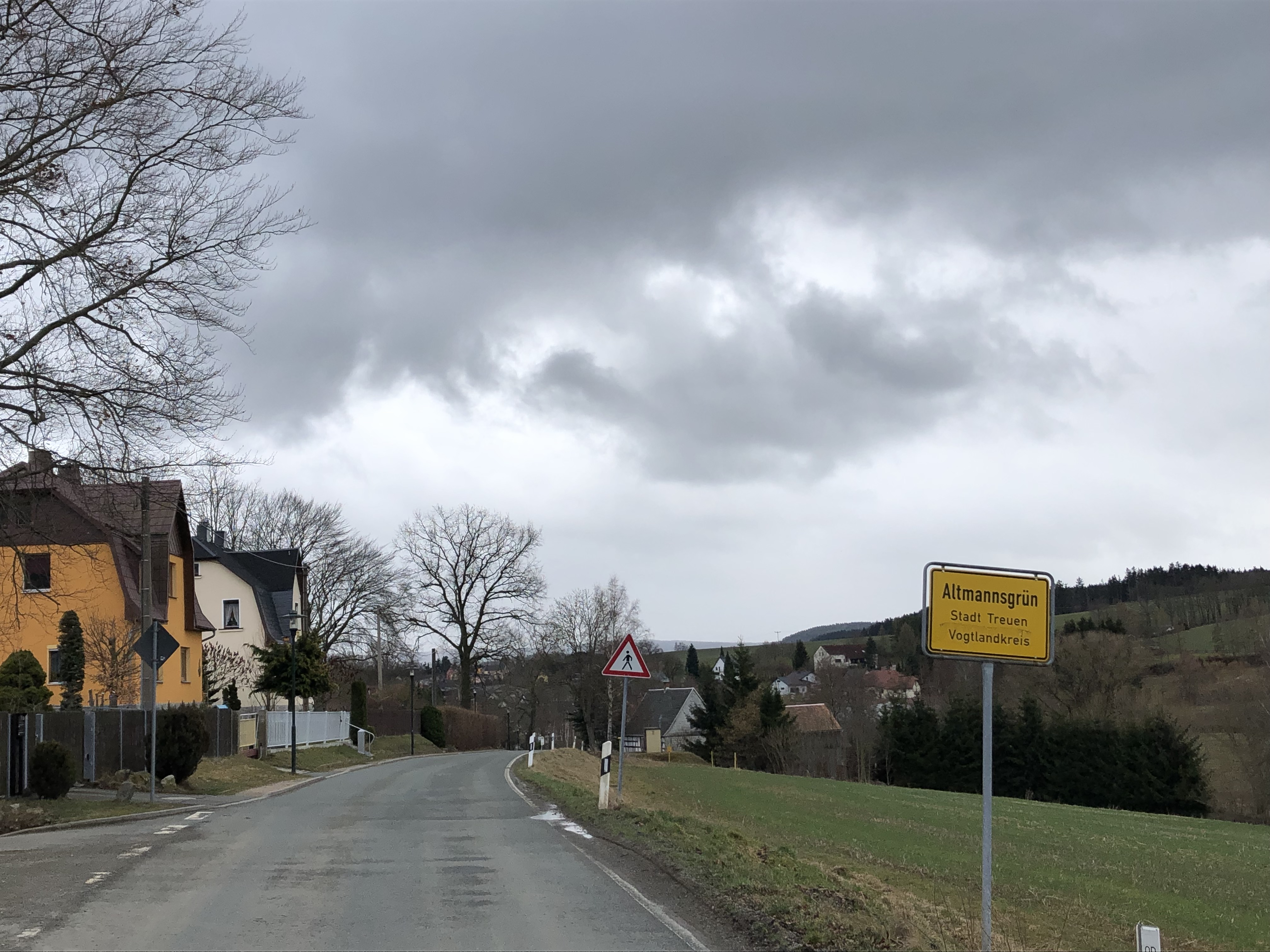 Altmannsgrün Ortsansicht